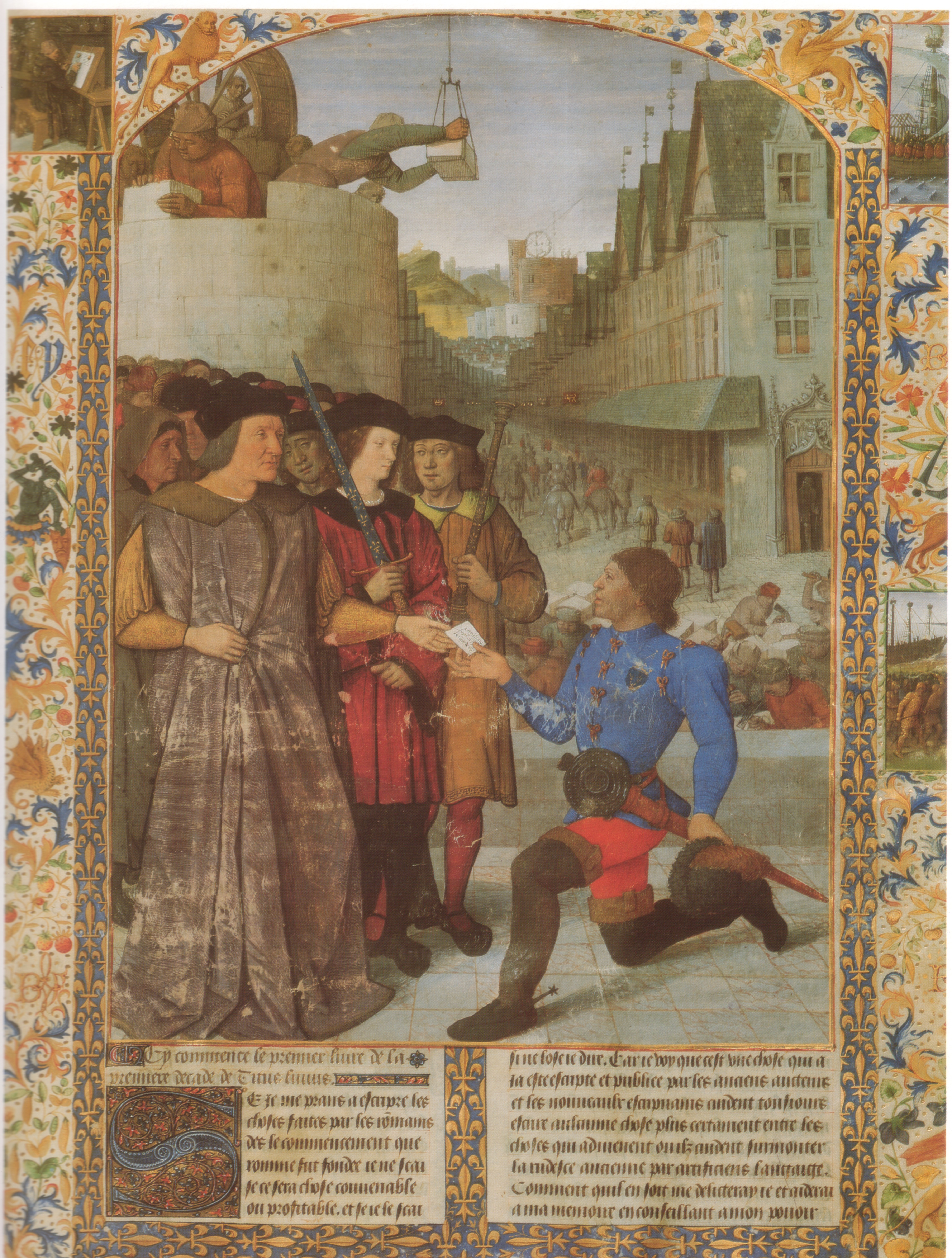 sog. "Livius_der_Sorbonne"